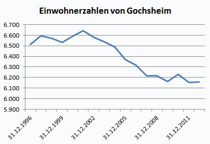 Einwohnerzahlen der Gemeinde Gochsheim (Unterfranken)